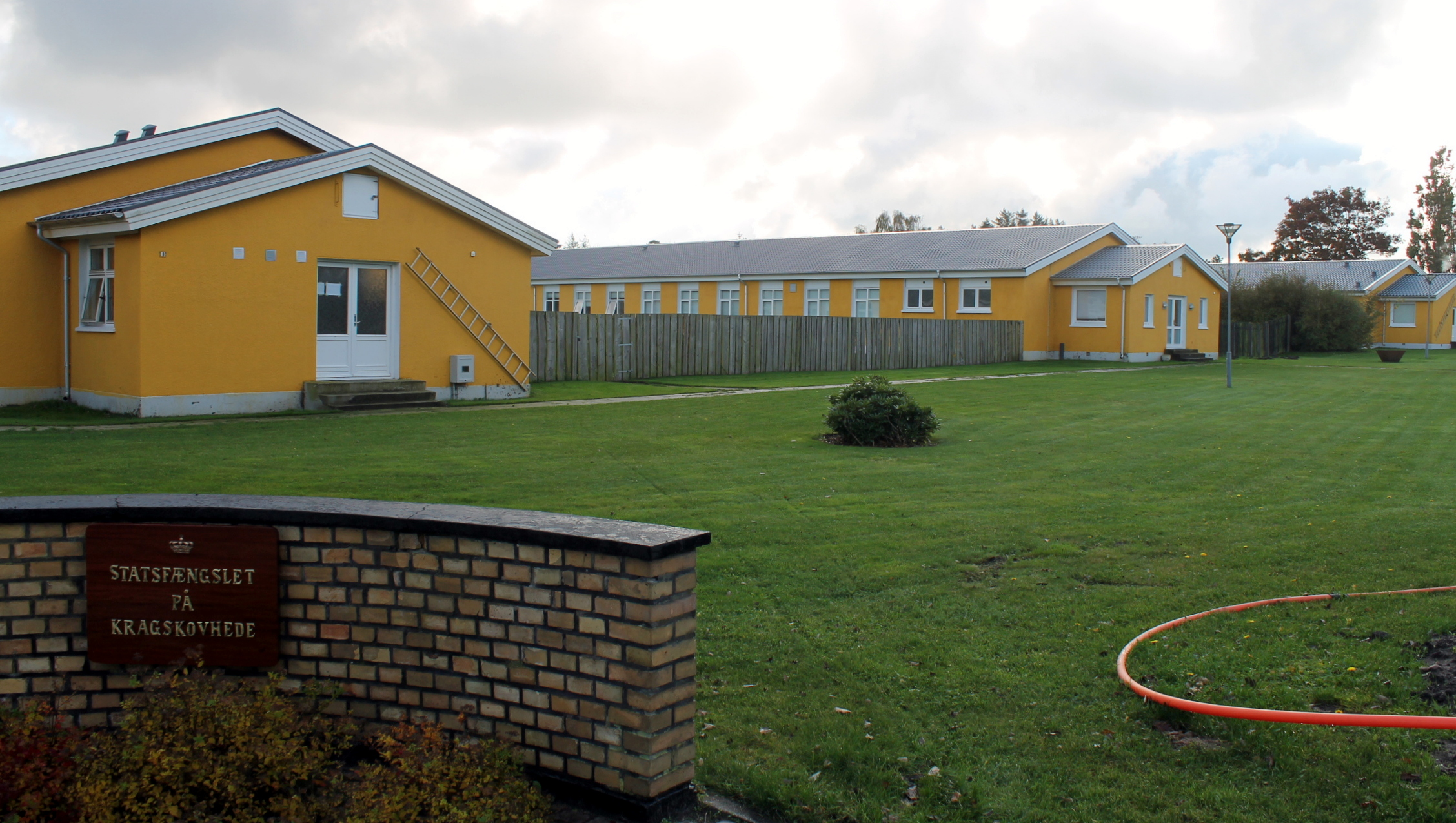 Statsfængslet på Kragskovhede, et af Kriminalforsorgens åbne fængsler, beliggende ca. 12 km nordvest for Frederikshavn i Kragskovhede